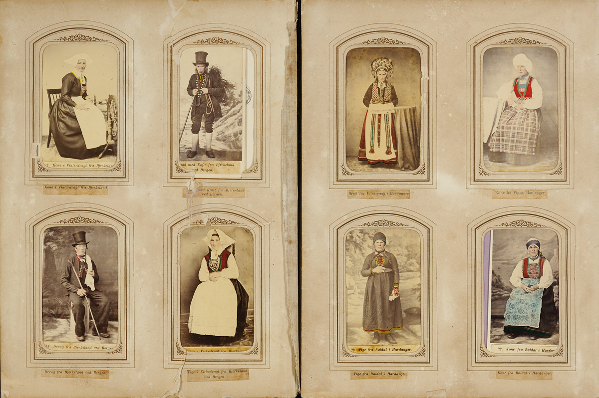 Album, Visittkort (carte de visite) Marcus Selmer Tittel: Kone i vinterdrakt fra Bjerkeland Tittel: Dreng fra Bjerkeland ved Bergen Tittel: Pige i kirkedrag fra Bjerkeland ved Bergens Tittel: Brud fra Ullesvang i Hardanger Tittel: Mann med kofte fra Bjerkeland ved Bergen Tittel: Kone fra Vigør, Hardanger Tittel: 78. Pige fra Røldal i Hardanger Tittel: 77. Kone fra Røldal i Hardanger